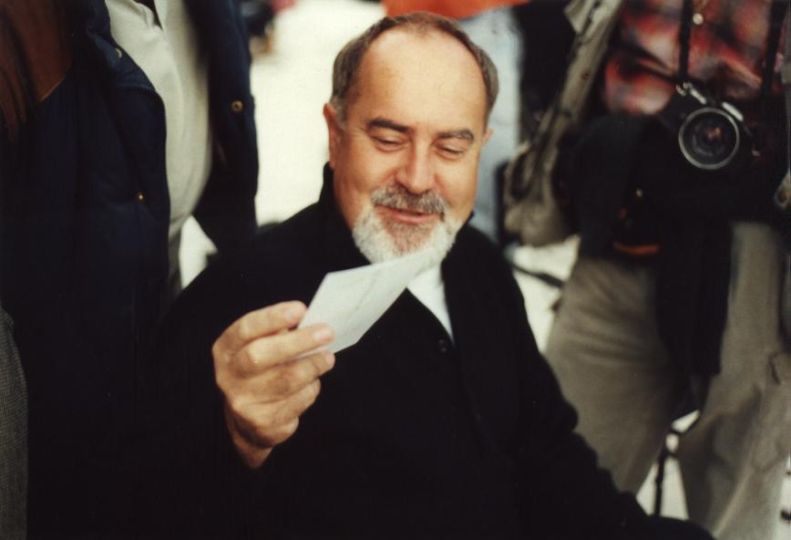 Spanish Film maker Bigas Luna